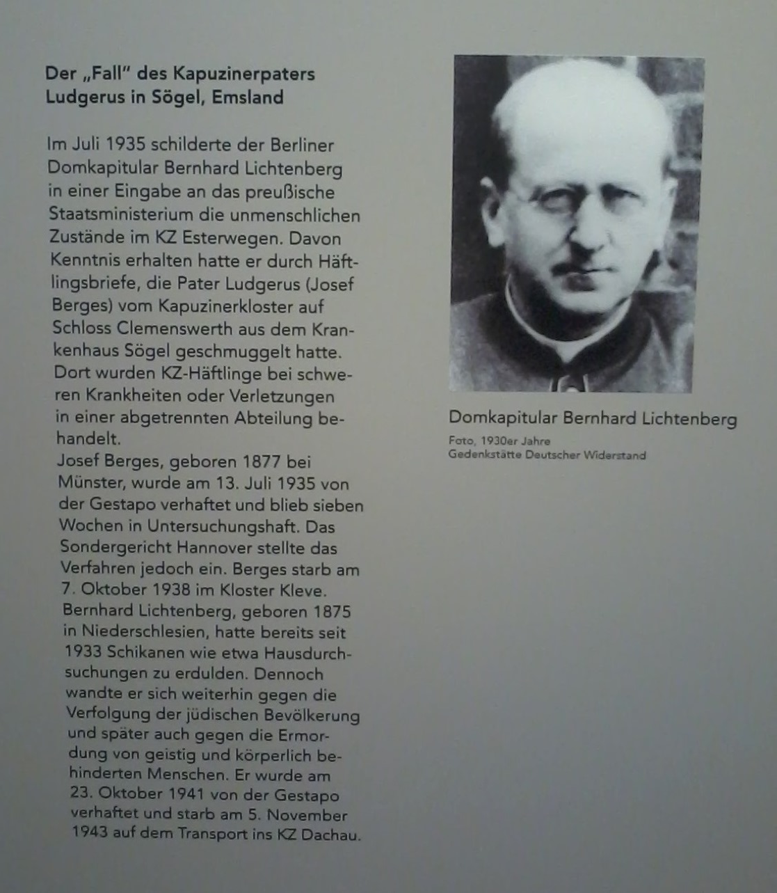 Gedenktafel für Bernhard Lichtenberg im ehemaligen KZ Esterwegen, der heutigen Gedenstätte Esterwegen